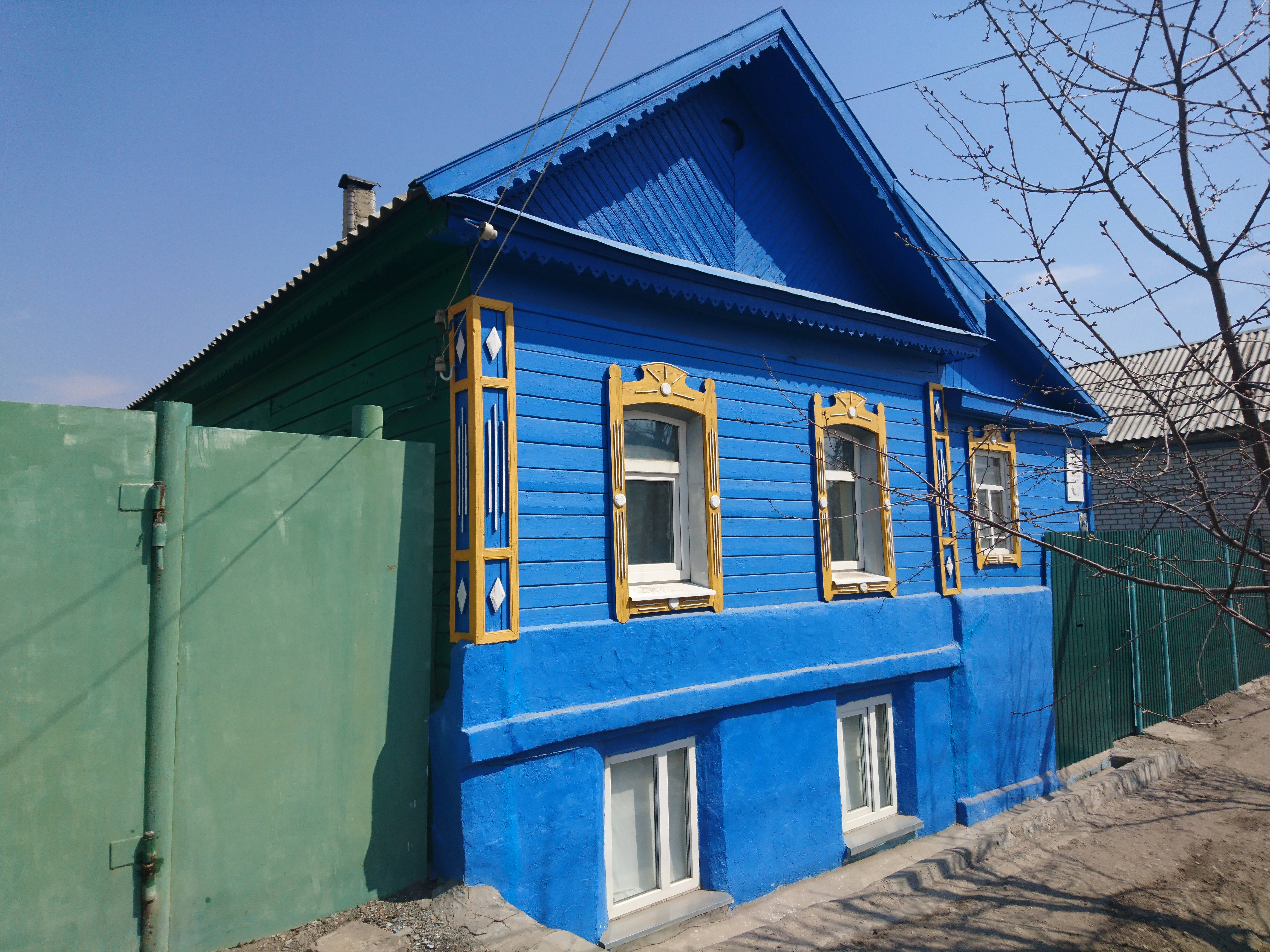 Дом, в котором родился и жил писатель Яковлев А.С.: улица Ленина, 148, Вольск, Саратовская область